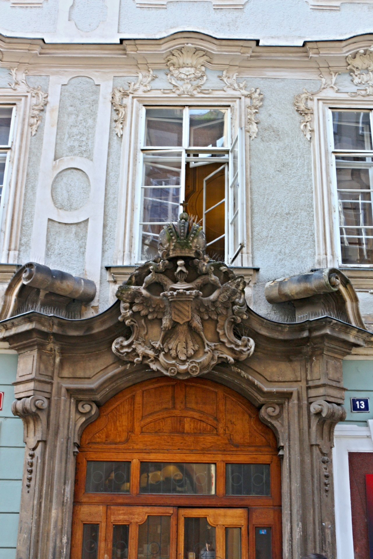 Millesimovský palác, Celetná